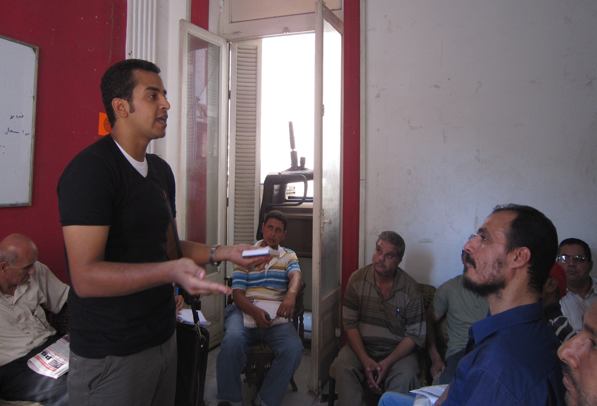 محاضرة للناشط الحقوقي والعمالي أحمد رجب سعده بمركز هشام مبارك للقانون